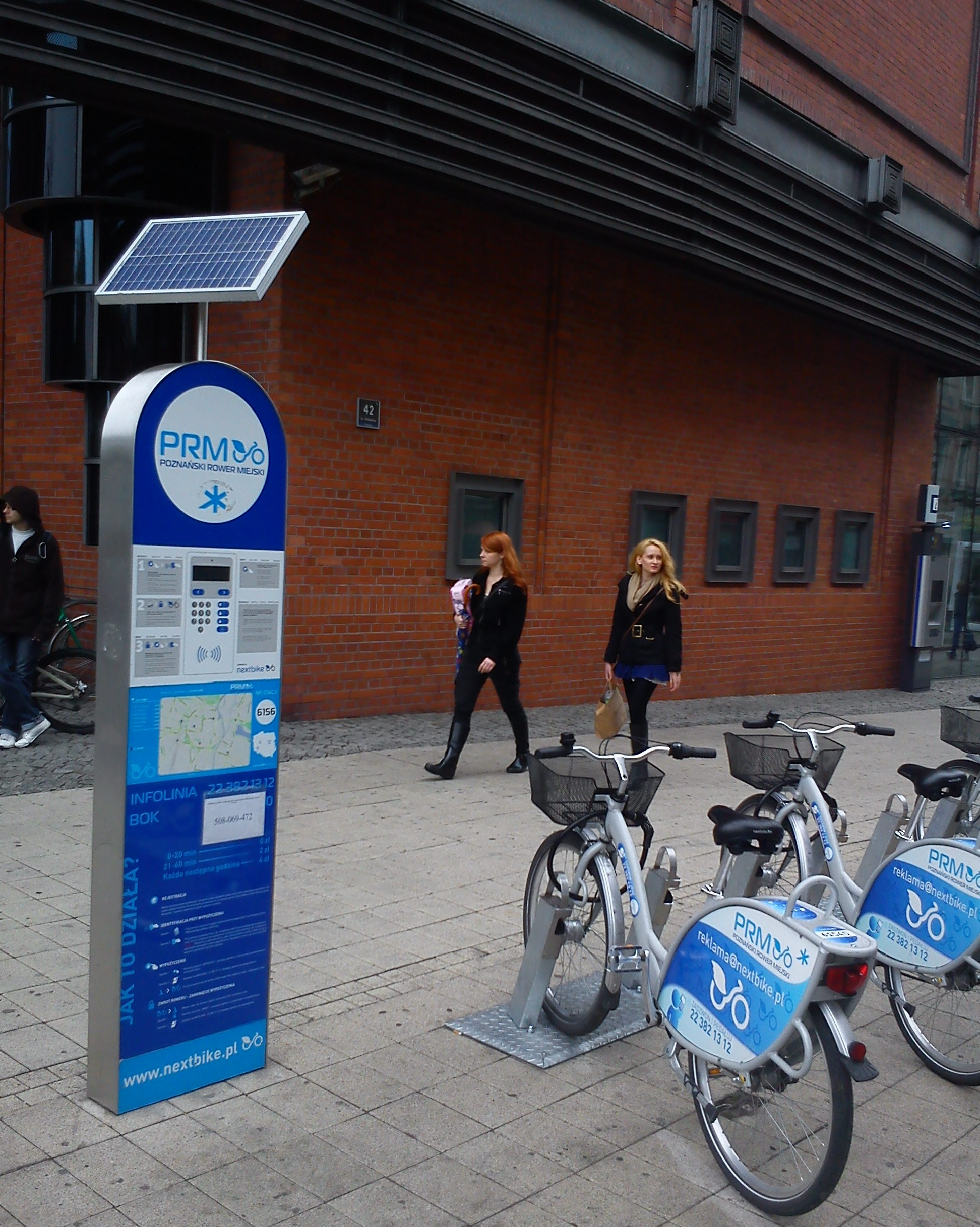 Poznań Urban Bike. Półwiejska street station.